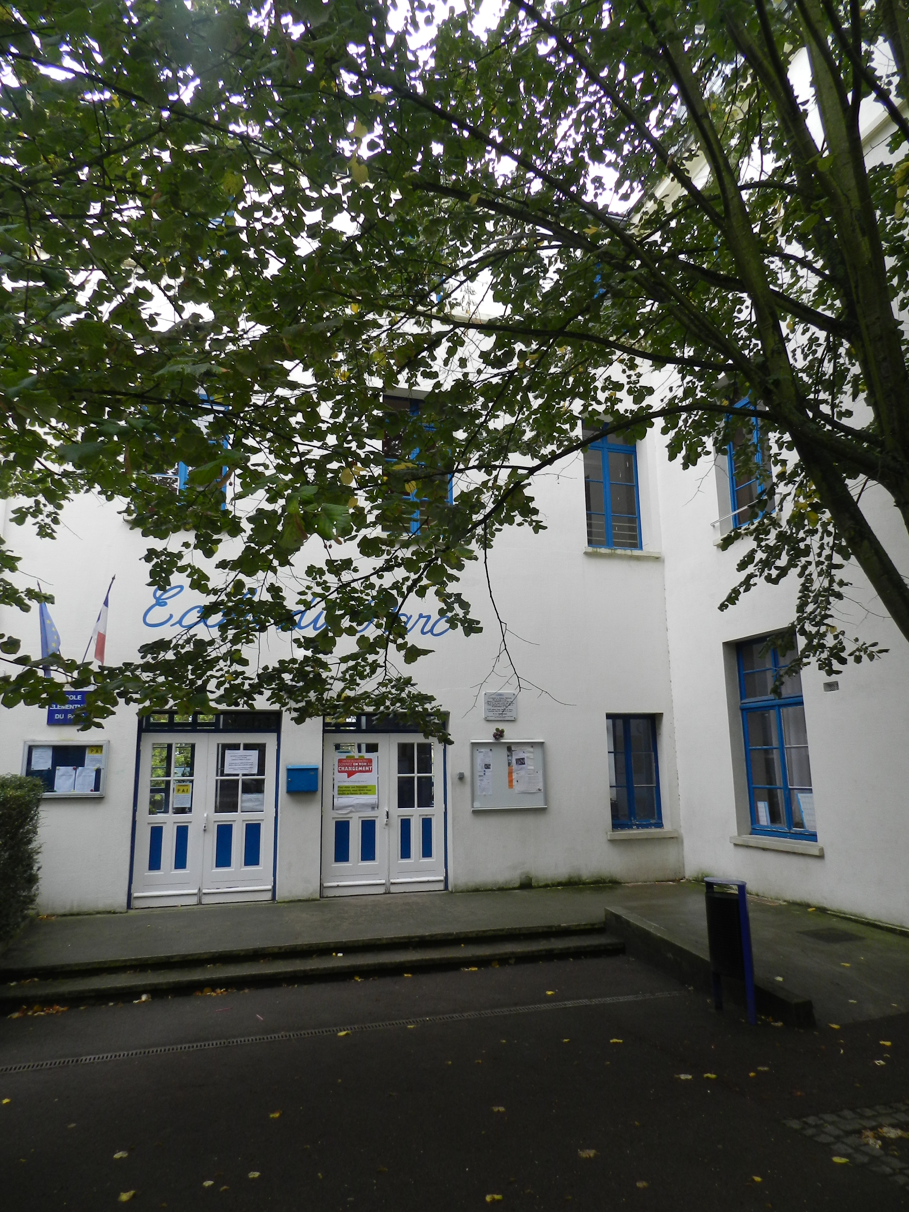 École du Parc de Fontenay-aux-Roses (Hauts-de-Seine).